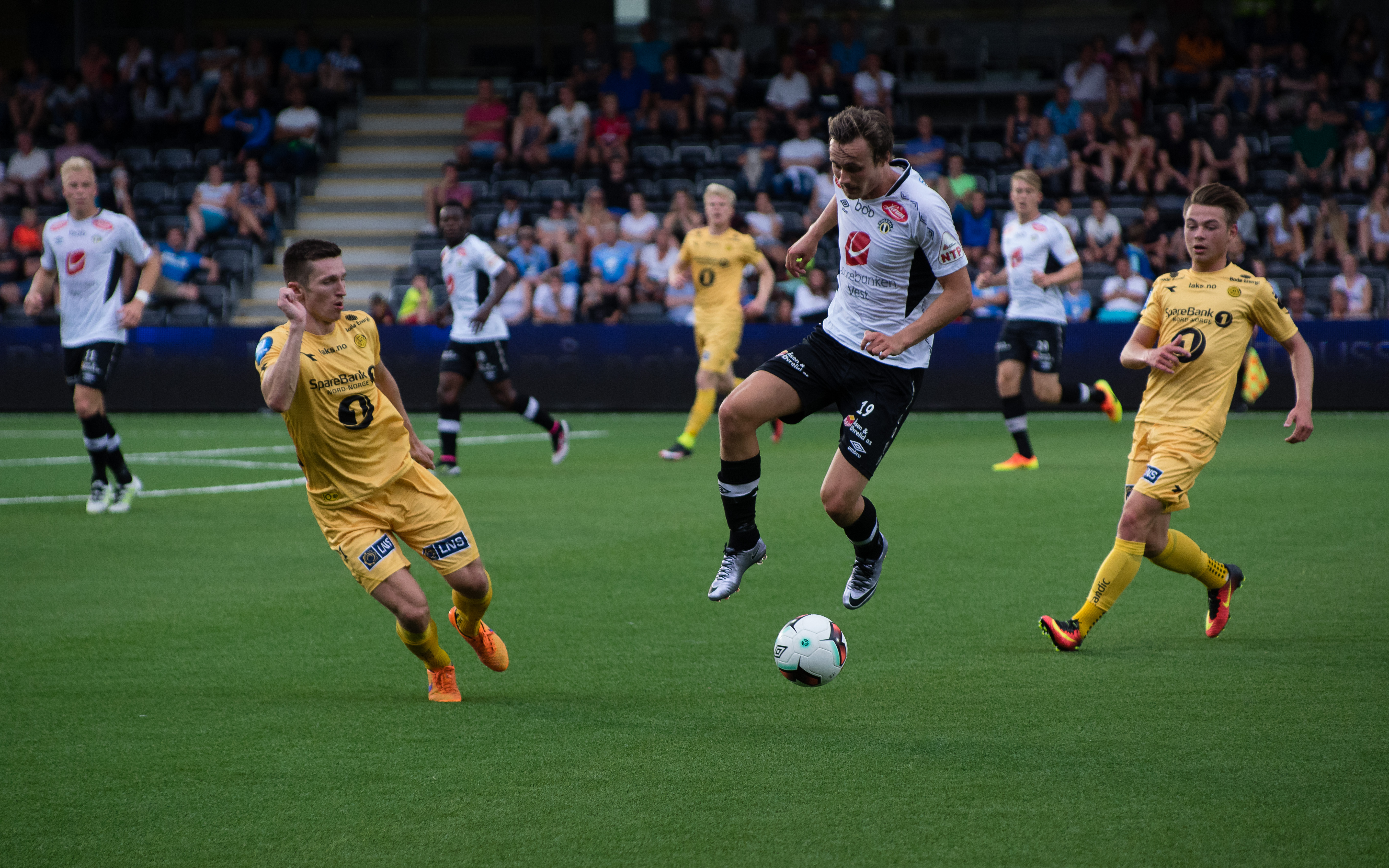 Ole Amund Sveen scora 2-2-målet mot Bodø-Glimt 24. juli 2016.